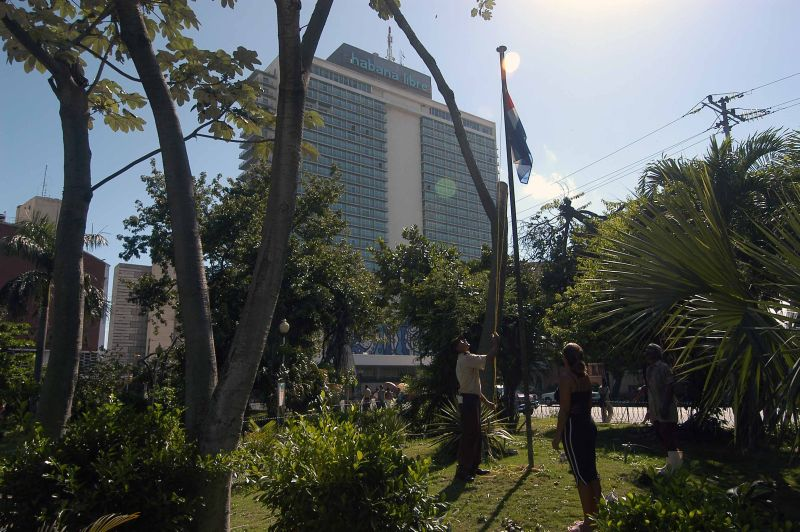 Hotel Habana Libre, Cuba, september 2005, info in de Metadata